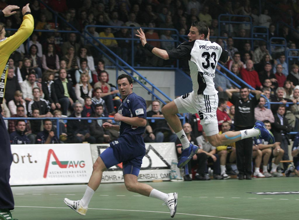 Dominik Klein, on December 30th 2006 in Aschaffenburg (Germany), during the game TV Grosswallstadt - THW Kiel (25:30)